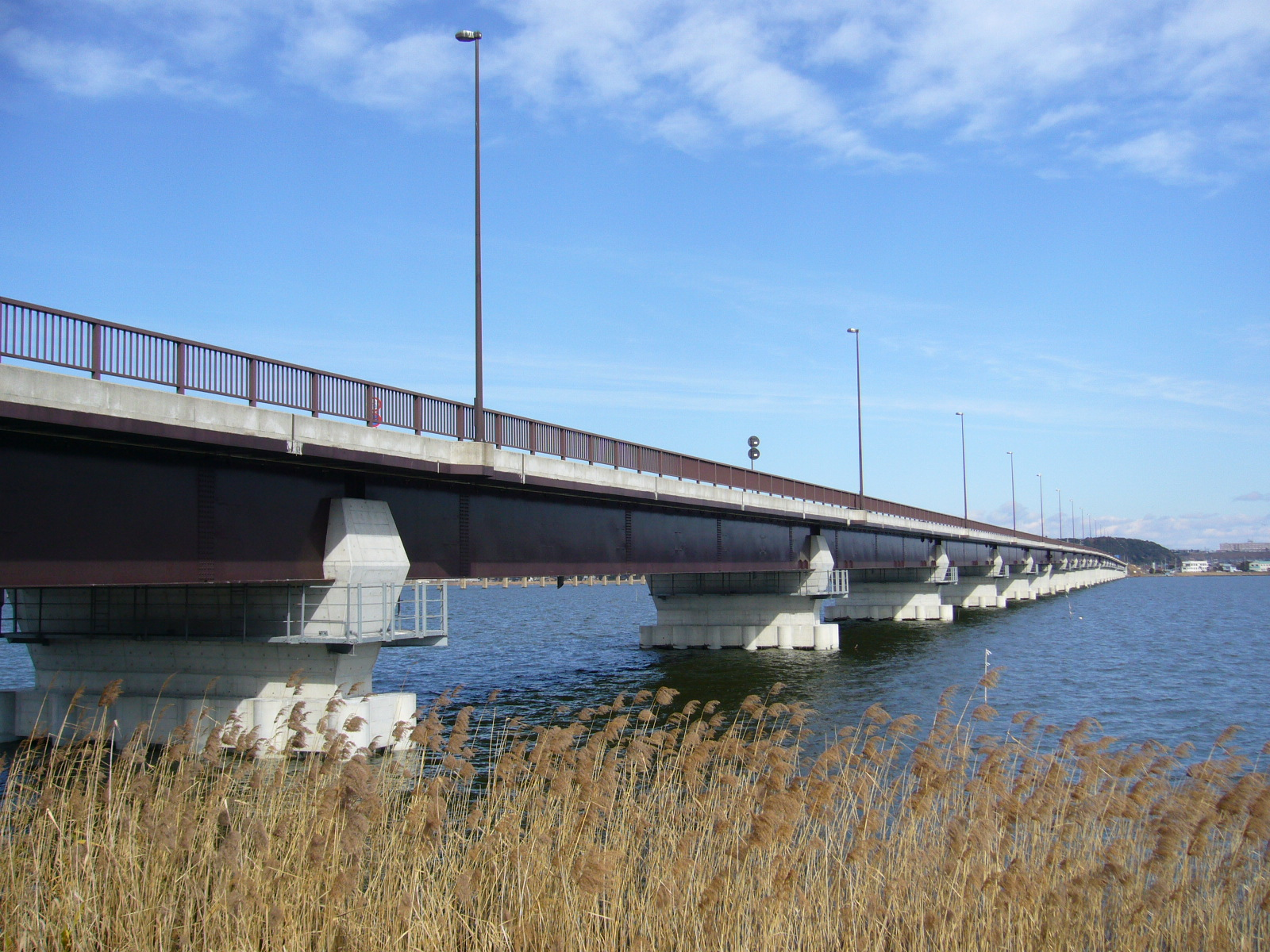 Jingu-bridge-III,jingu bashi,kashima-city,japan